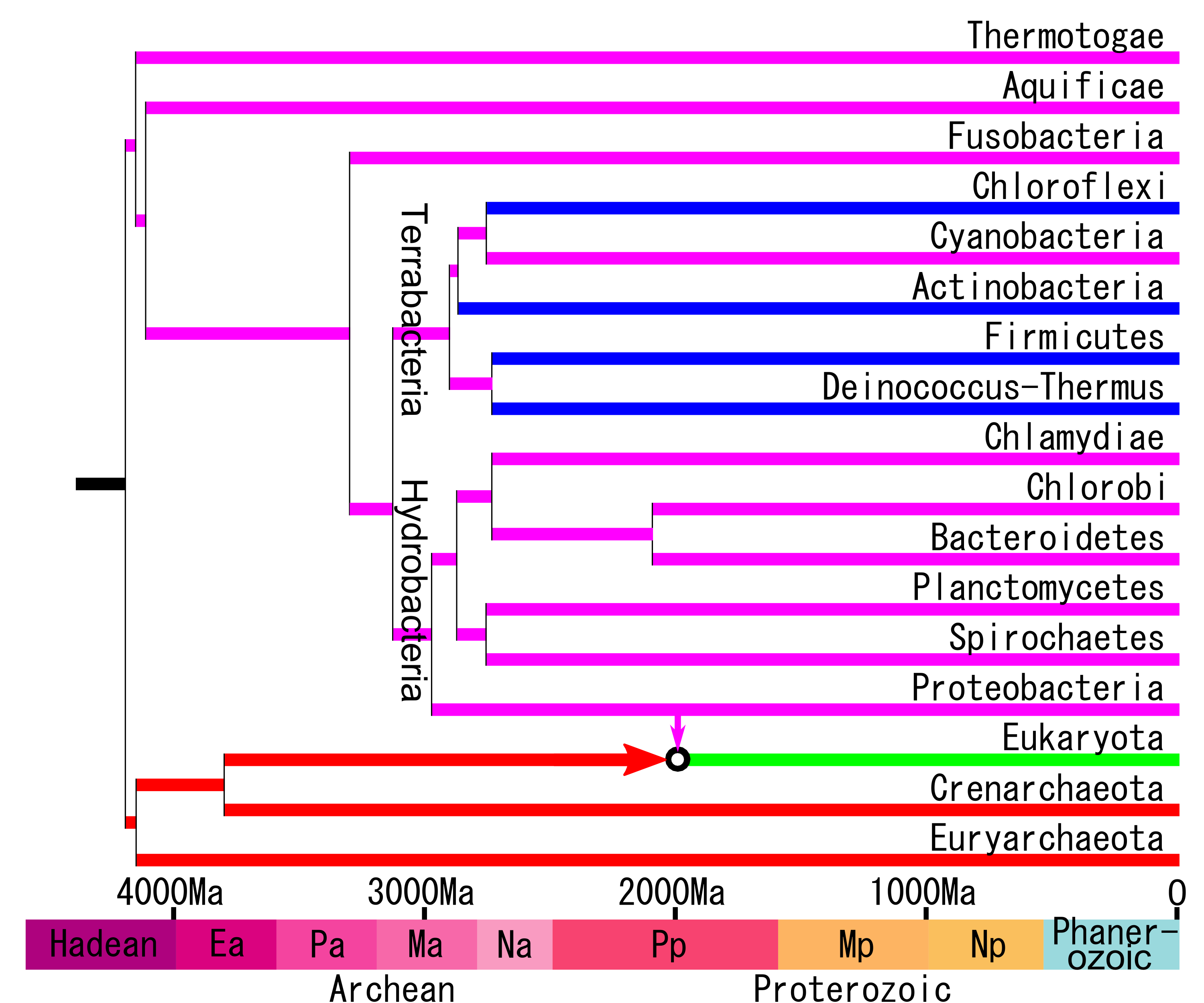 other versions